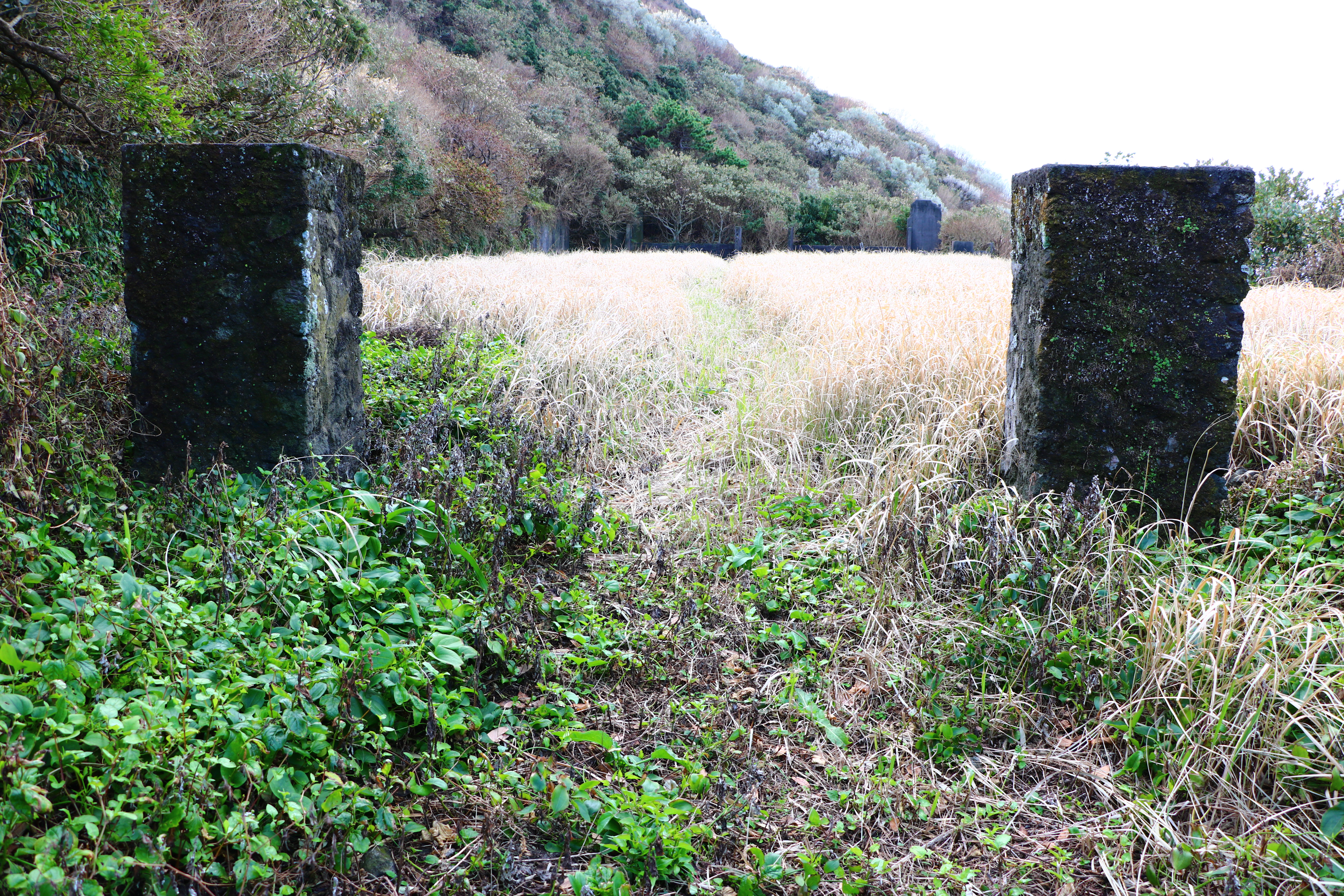 八丈小島の鳥打小中学校跡地（東京都八丈町）